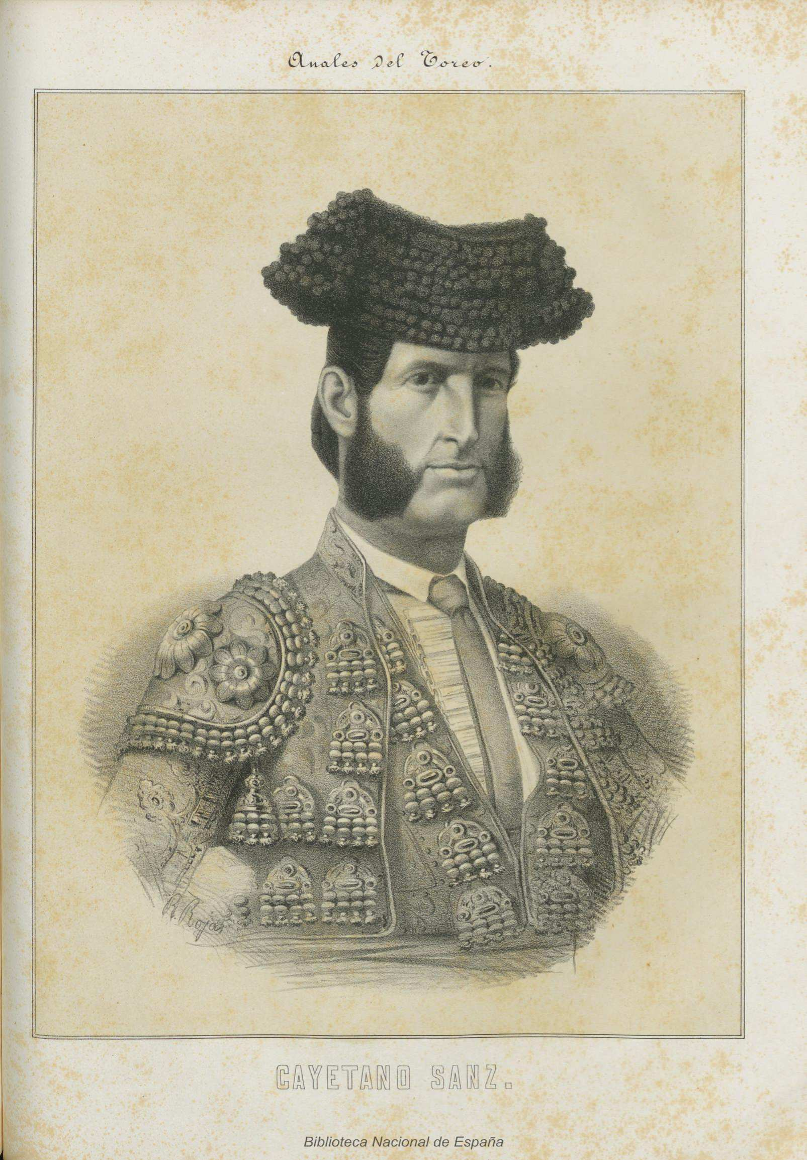 Cayetano Sanz, litografía de R. Rojas. Ilustración de Anales del toreo: reseña histórica de la lidia de reses bravas: galería biográfica de los principales lidiadores: razón de las primeras ganaderías españolas, sus condiciones y divisas obra escrita por José Velázquez y Sánchez; e ilustrada por reputados artistas, Madrid, 1888.